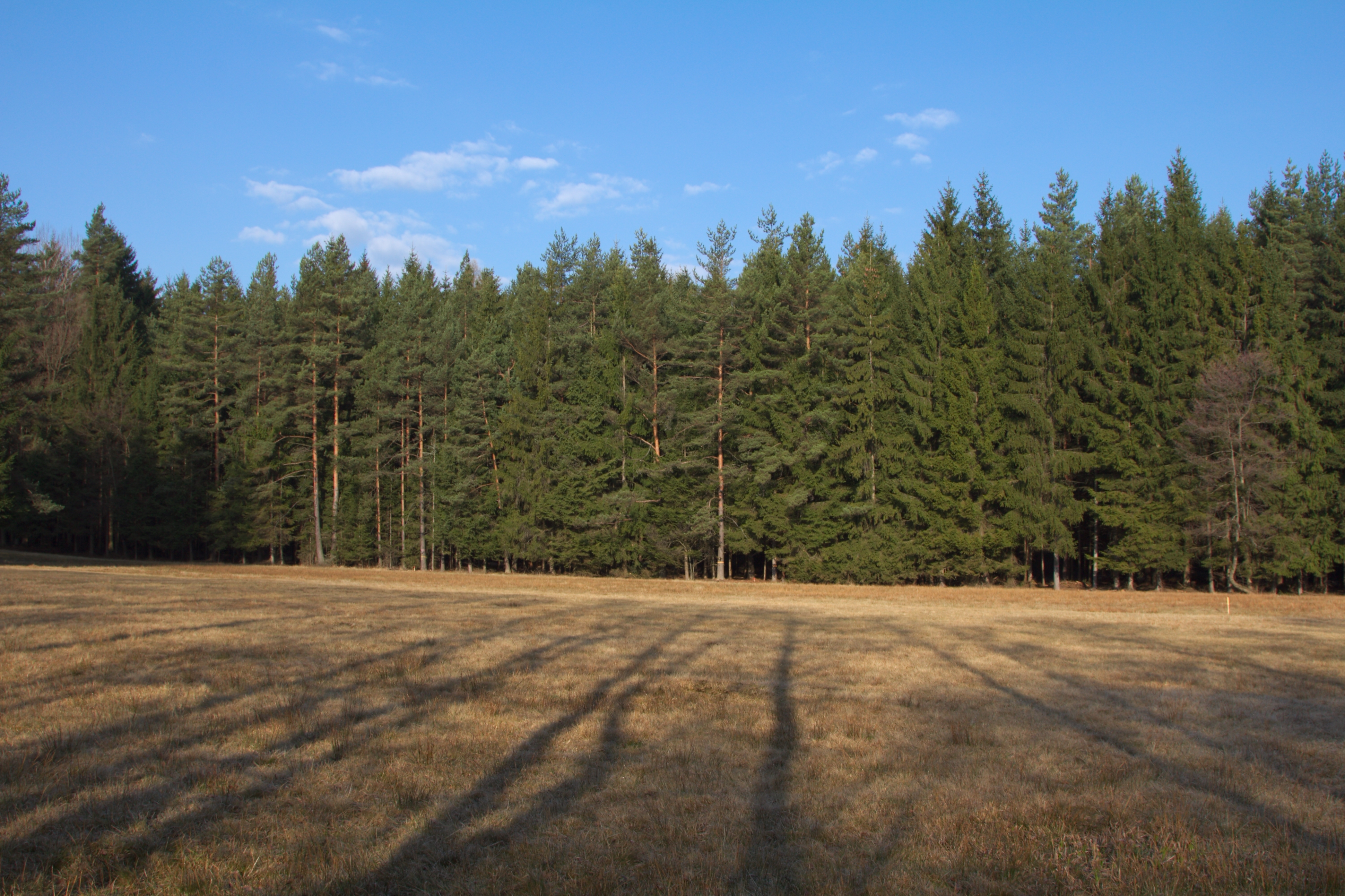 PP Kaliště